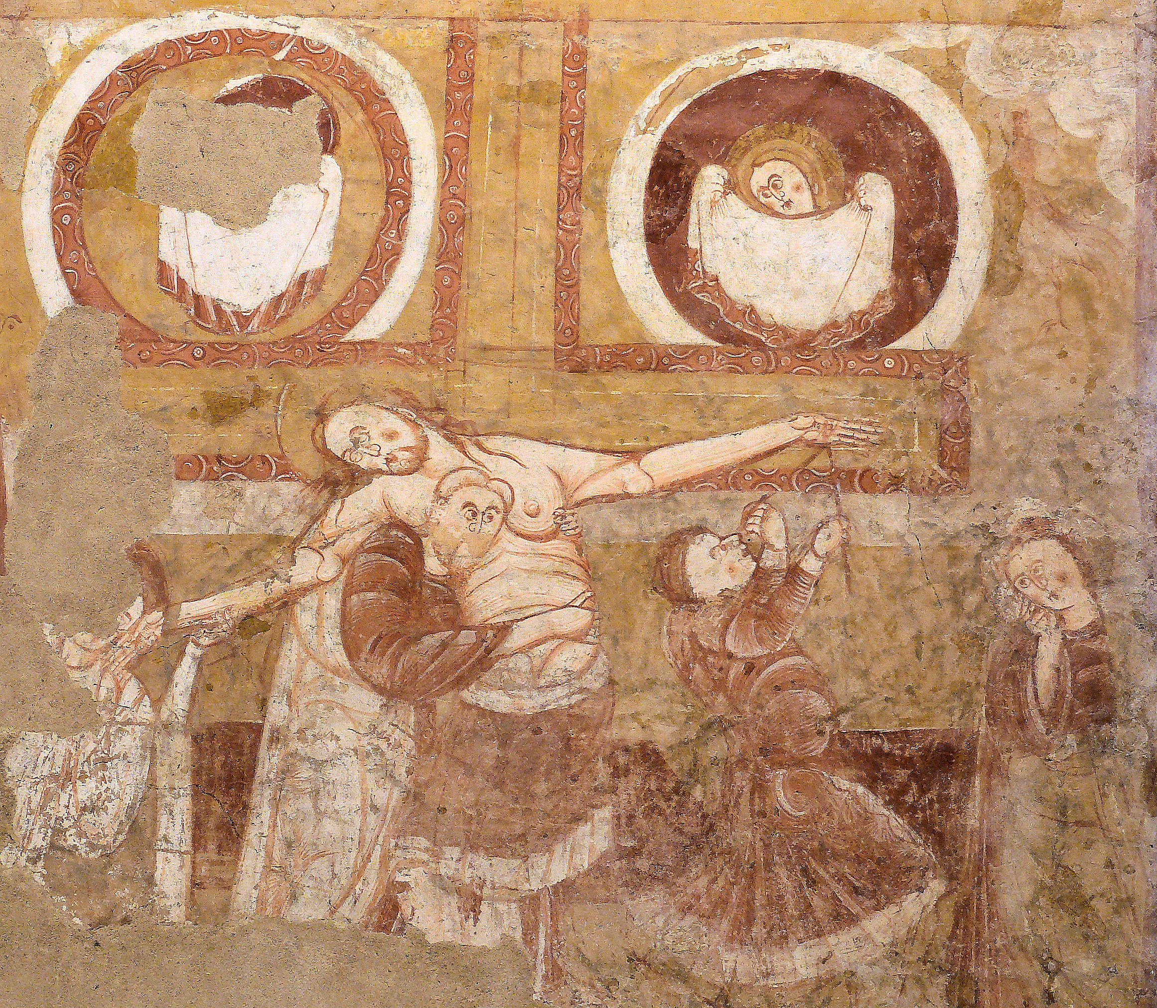 Vic - Eglise Saint-Martin - Descente de la Croix